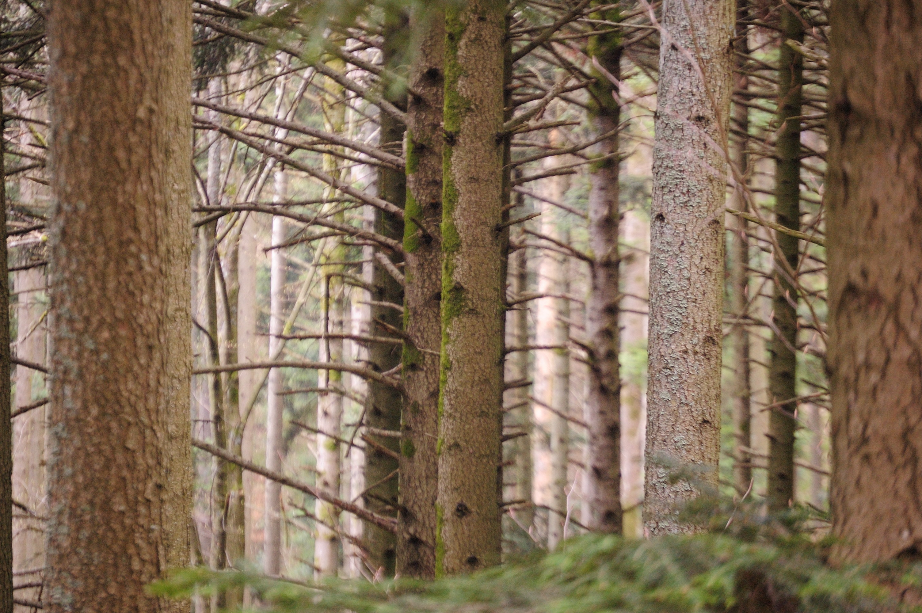 Tree trunks